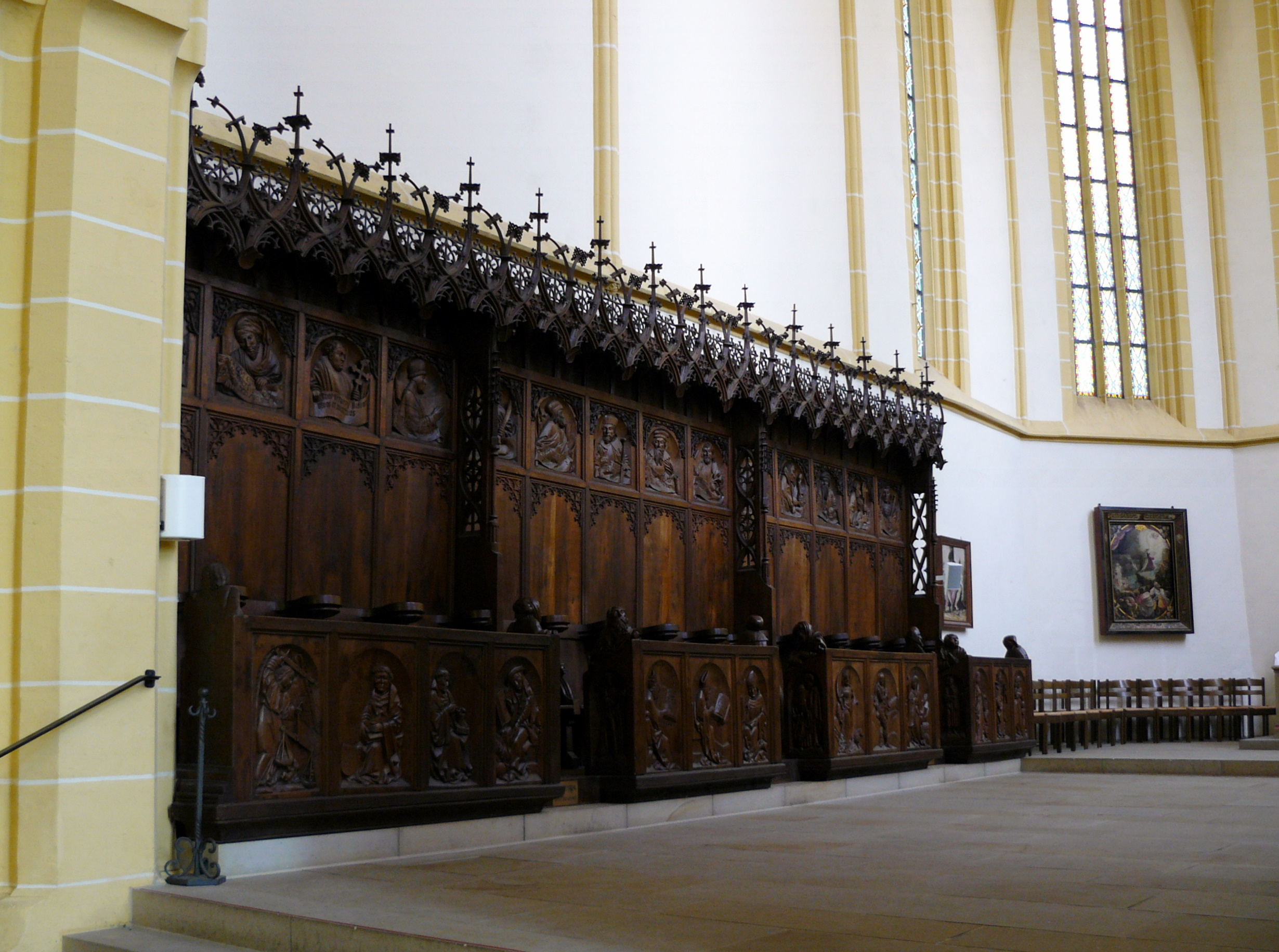 Chorgestühl der evangelischen Stiftskirche Herrenberg